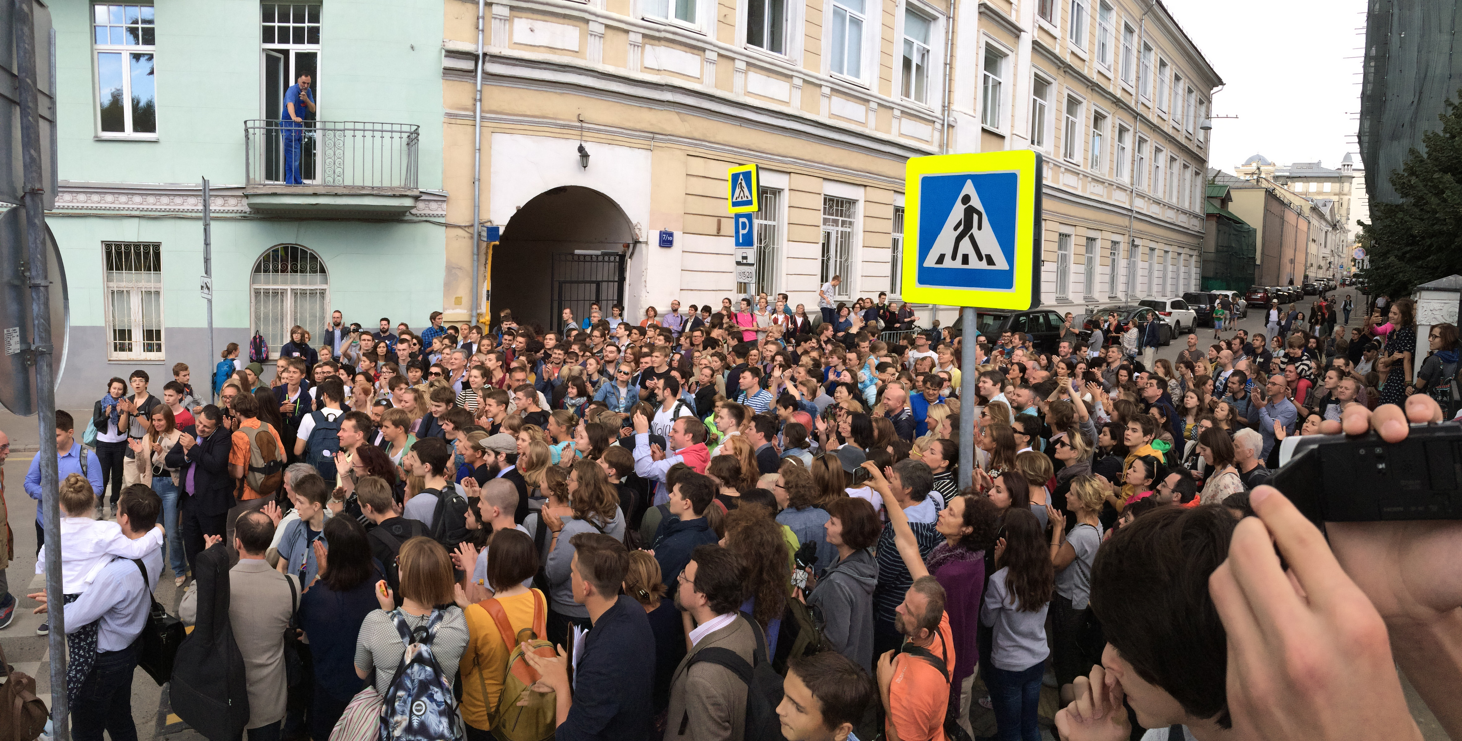 Улица Знаменка